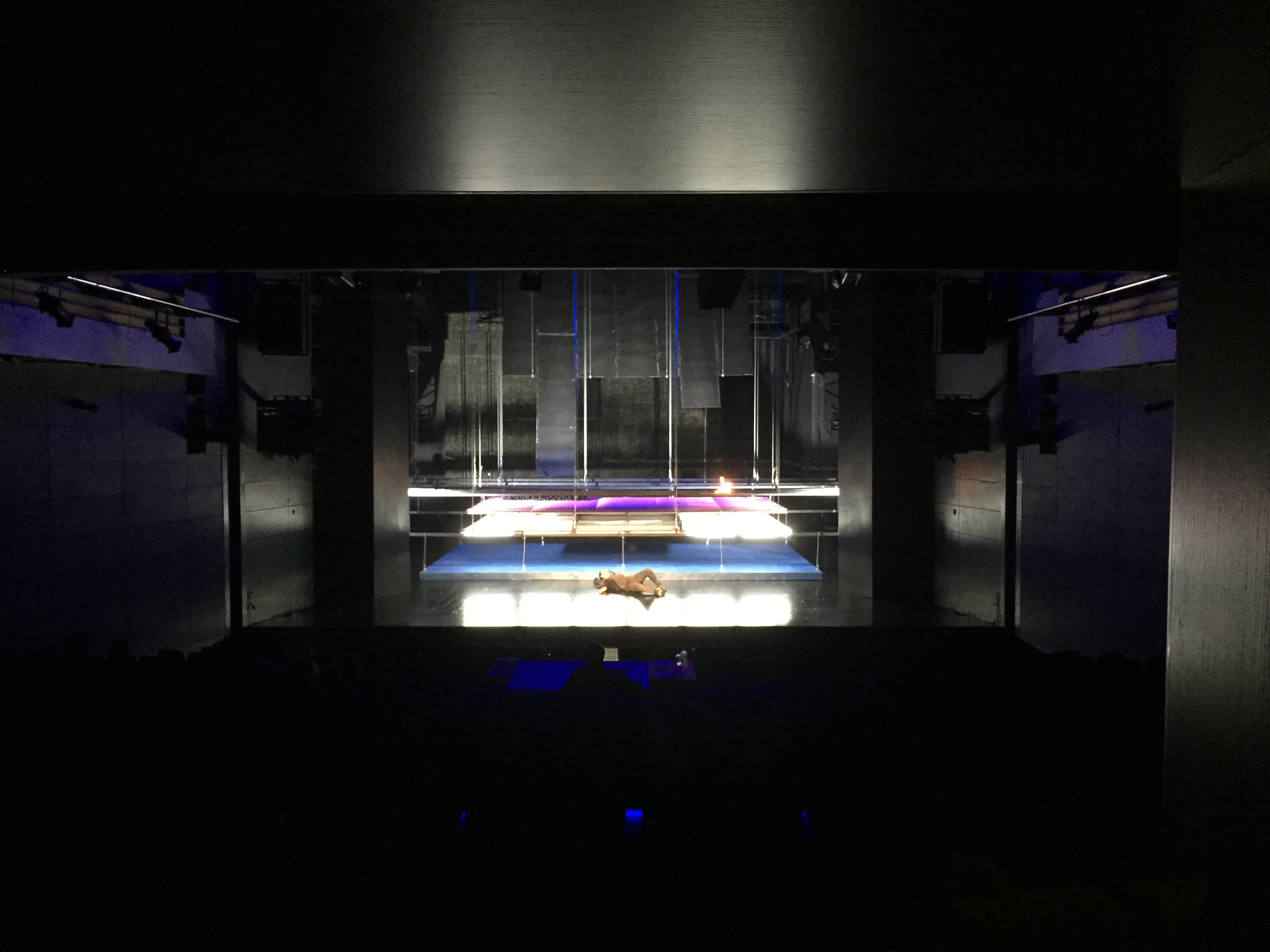 Snimak scenografije pozorišne predstave Dnevnik o Čarnojeviću-JDP, 2014. Autor:Jasmina Holbus